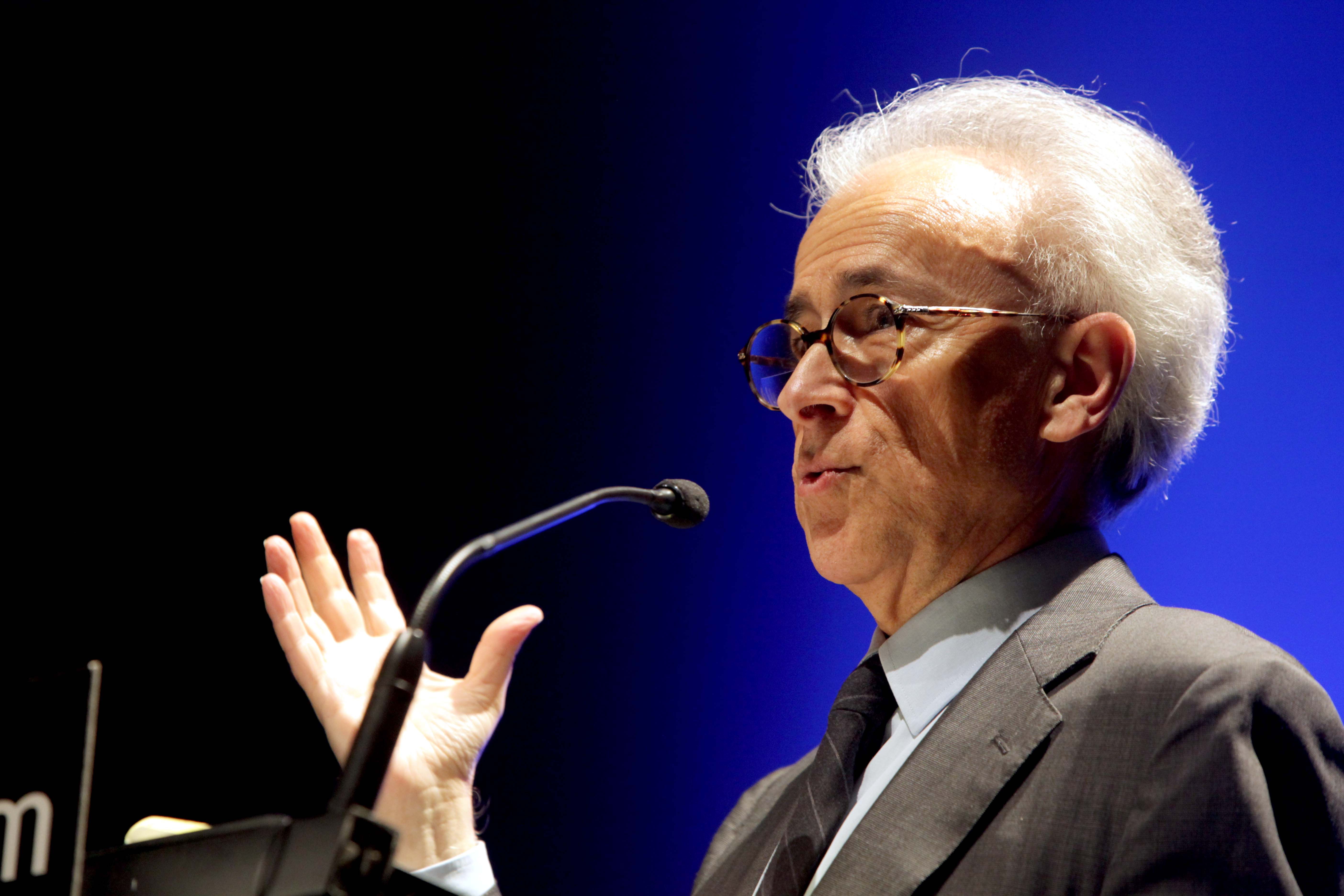 Convidado: António Damásio, neurocientista português Data: 26 de junho de 2013 Local: Teatro Geo - Complexo Ohtake Cultural - São Paulo Crédito: Greg Salibian